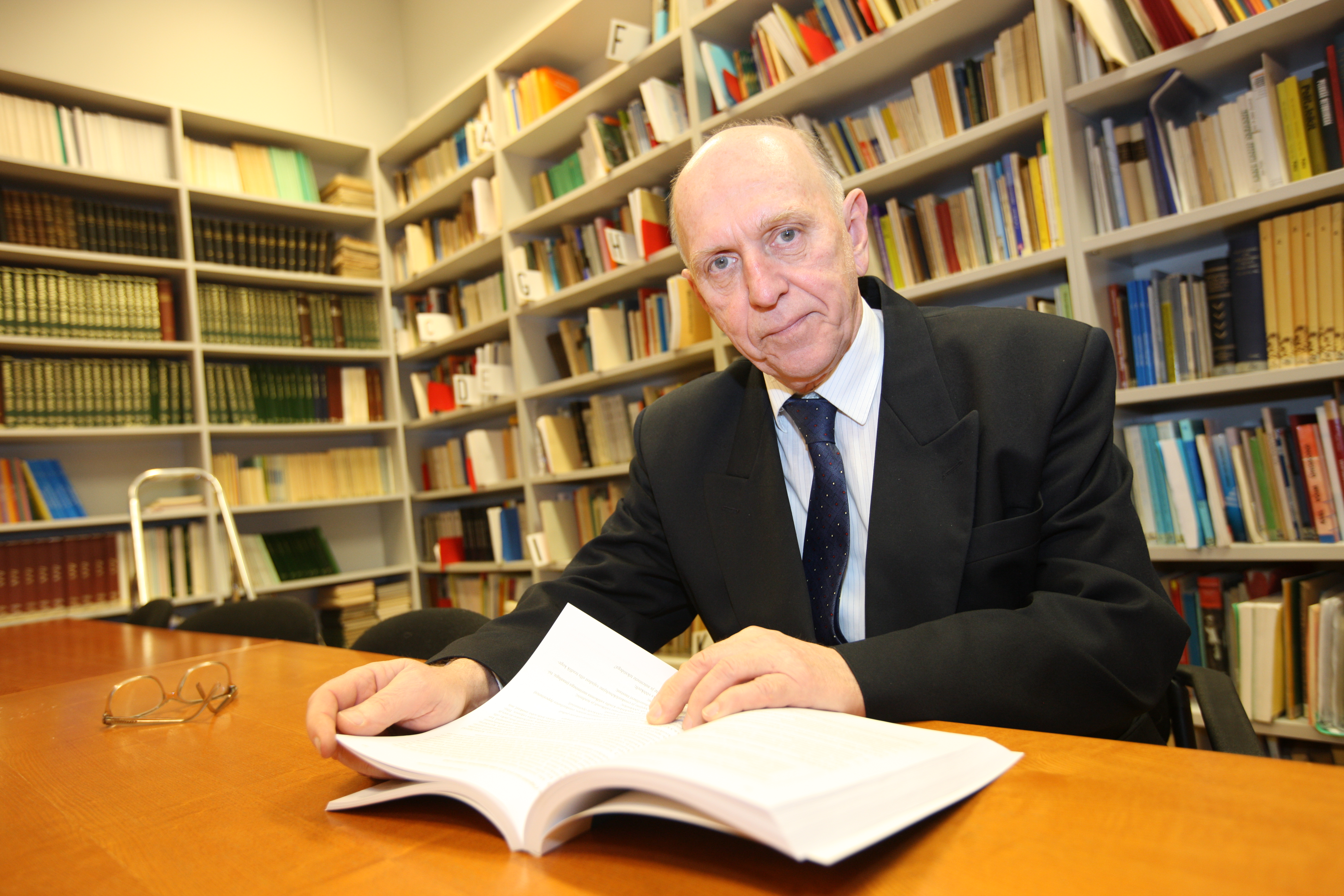 TÜ emeriitprofessor, Tartu Ülikooli eesti ja üldkeeleteaduse instituudi erakorraline vanemteadur Mati Erelt oma töökabinetis.